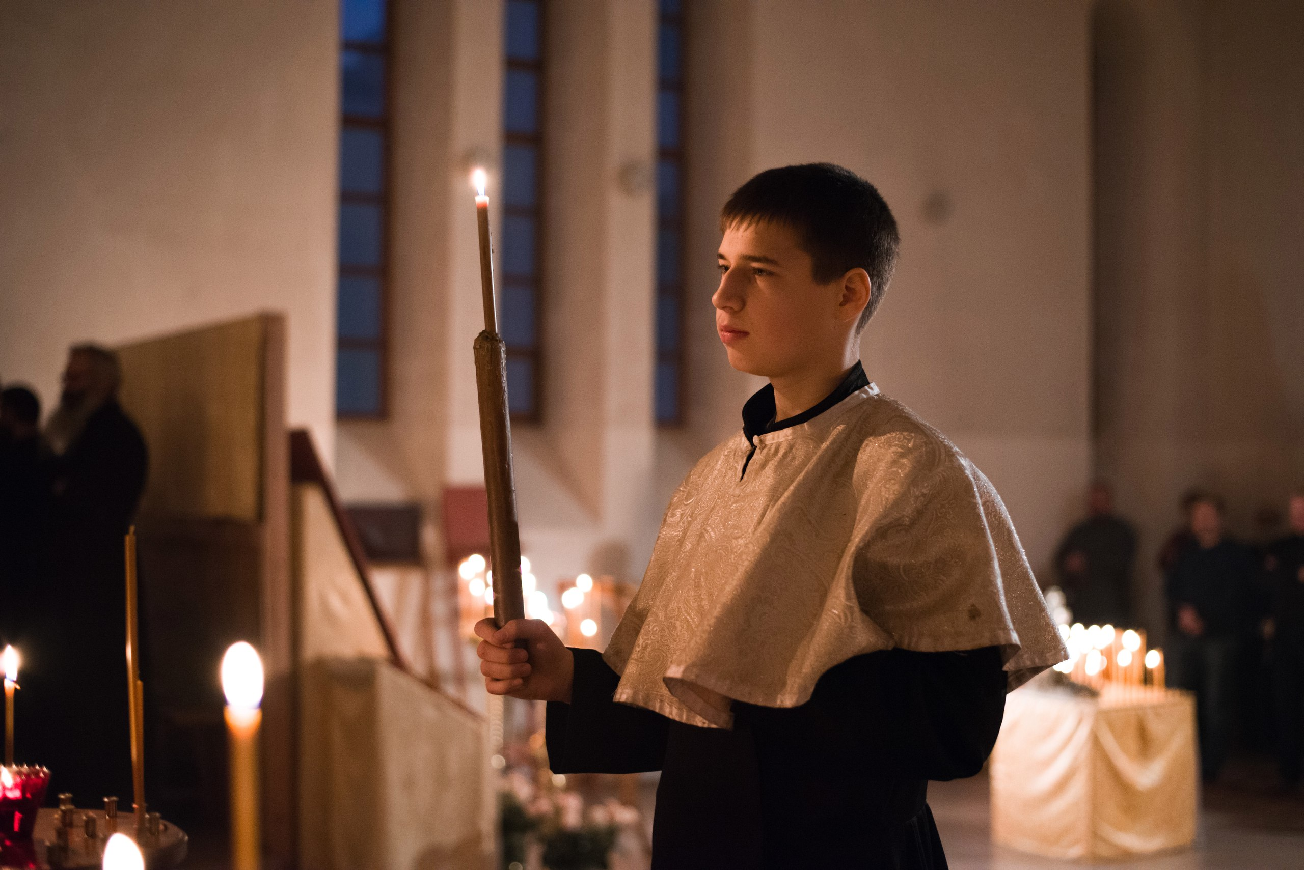 Фотография свещеносца Русской Православной Старообрядческой Церкви